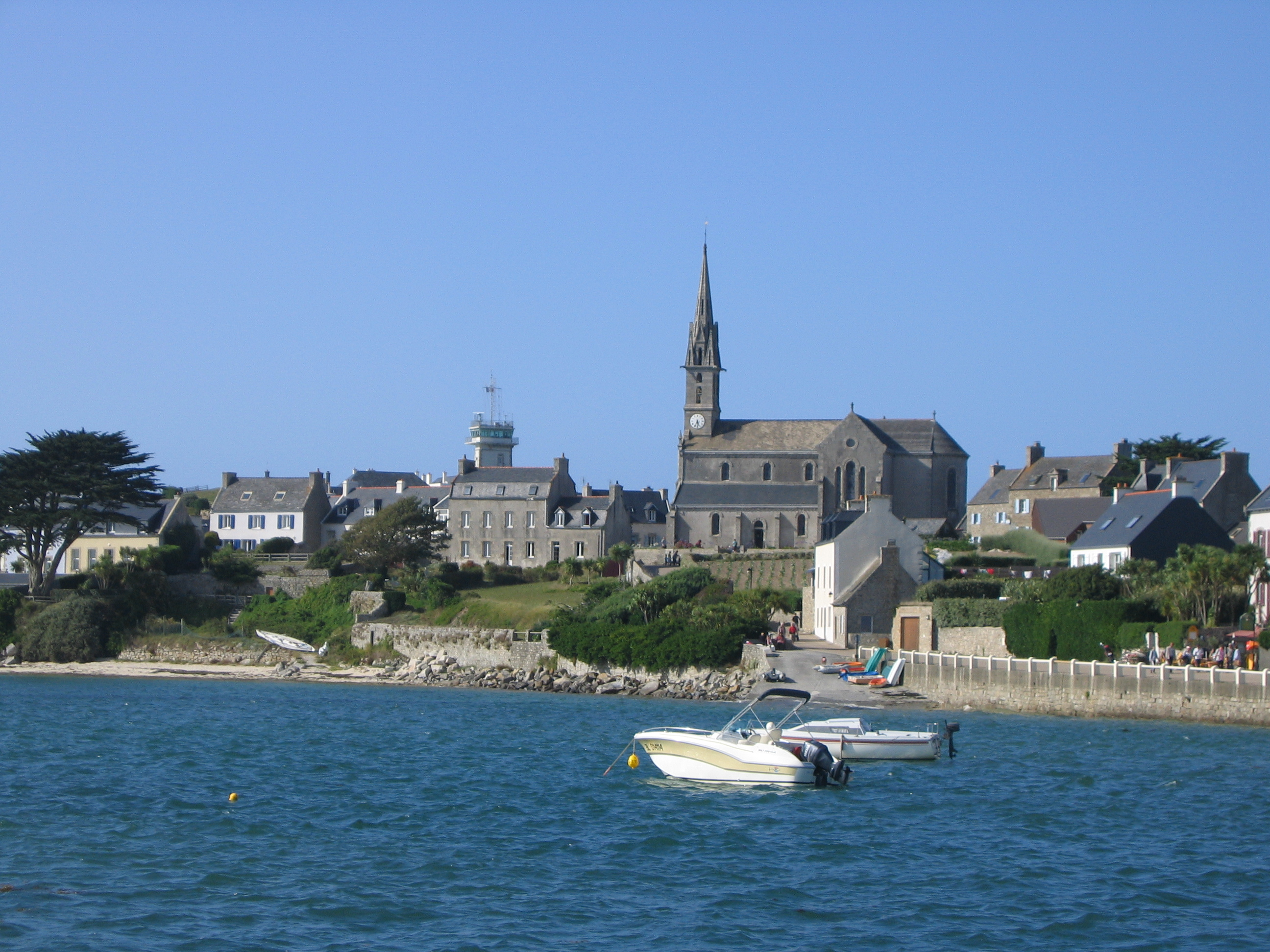 Vue de l'île de Batz et de l'église Notre Dame.